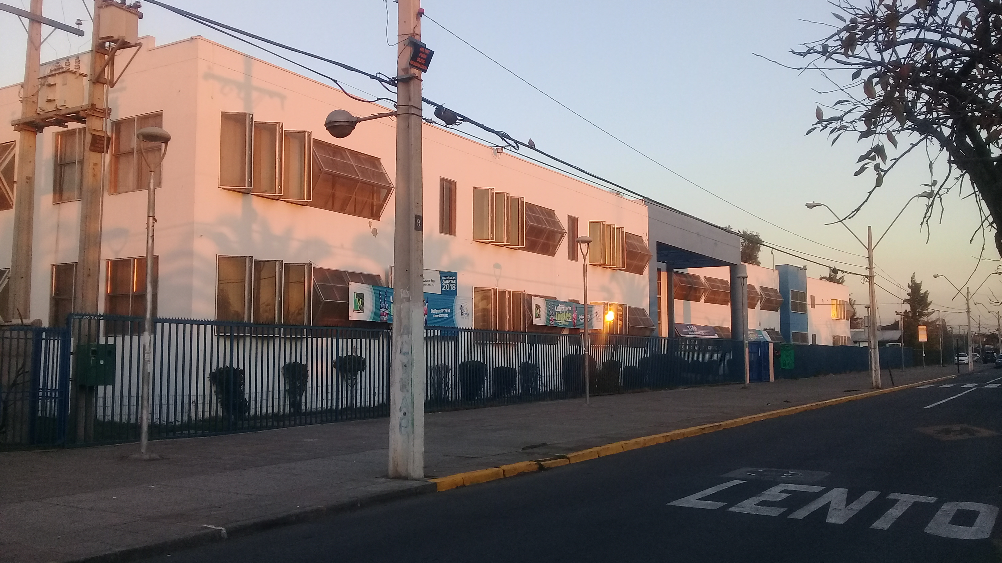 Liceo Malaquías Concha de la comuna de La Granja.